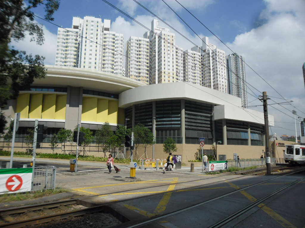 中文（香港）: 屯門西北游泳池 (2013年年初)